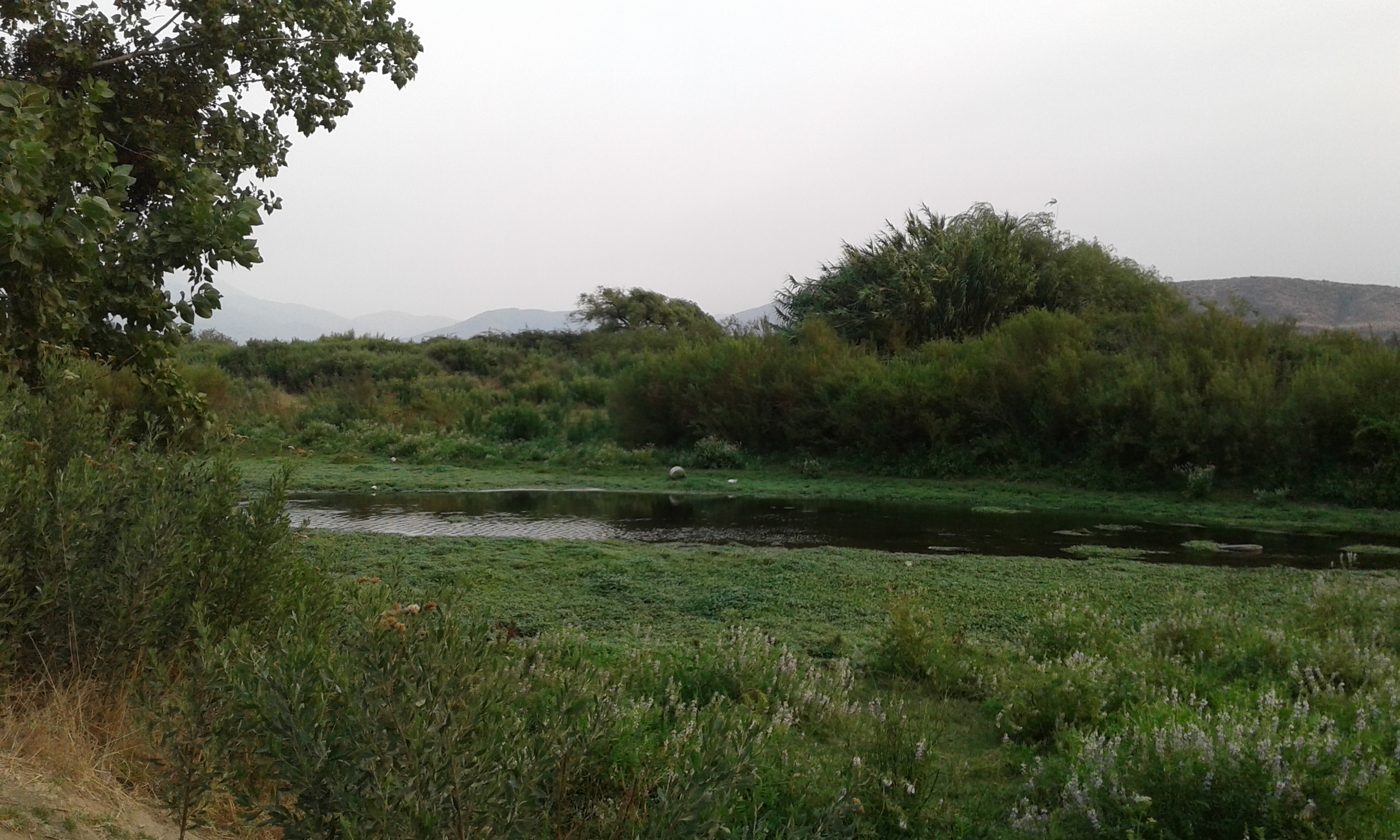 Ribera norte del estero Limache. El estero Limache es un curso de agua ubicado en la Región de Valparaíso, Chile.